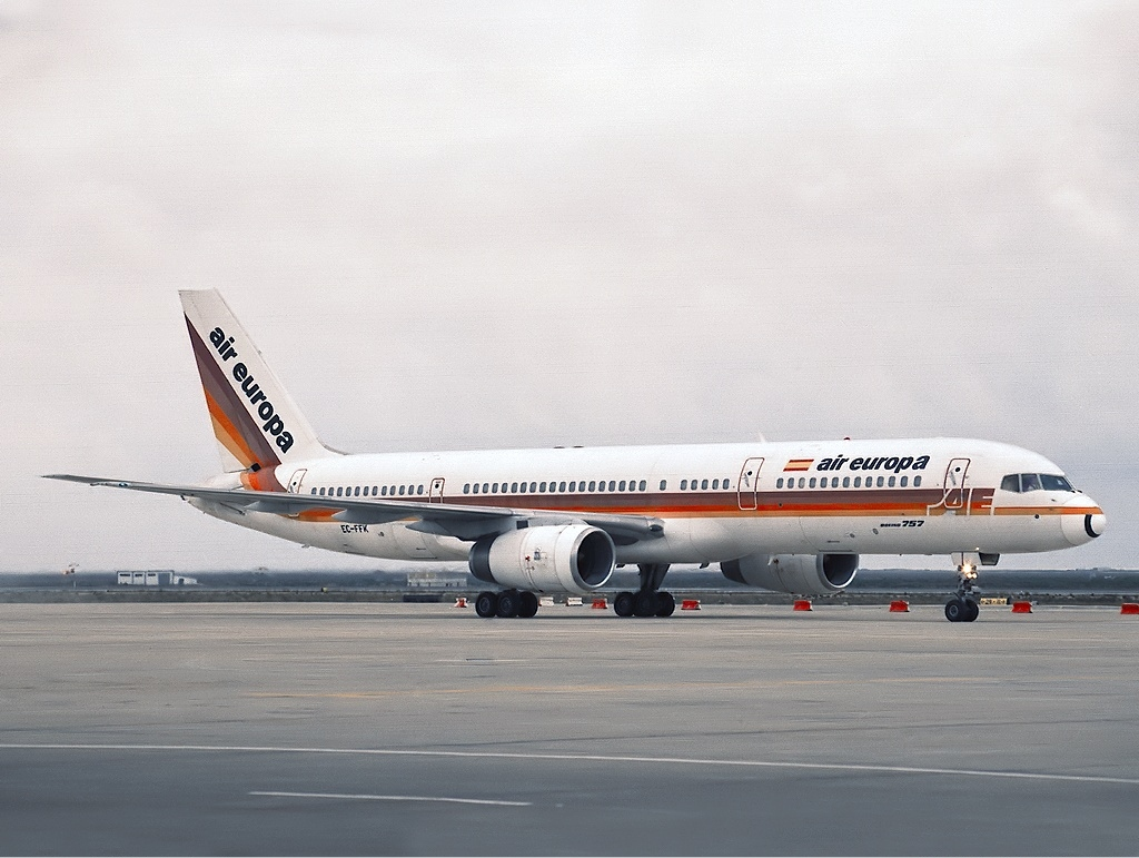 Air Europa Boeing 757-200